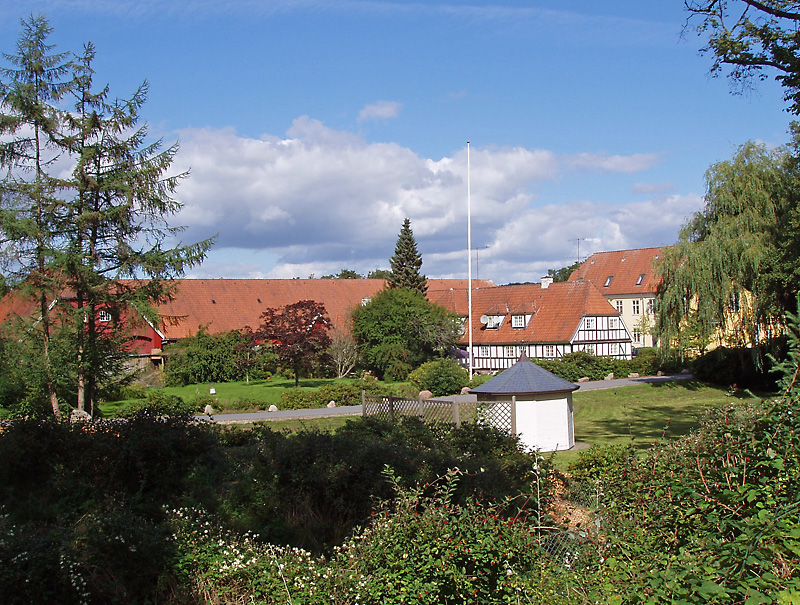 Ry Mølle Avlsgården da: Rye Mølle , Ry, Tyrsting Herred, .Århus Amt (tidligere Skanderborg Amt)